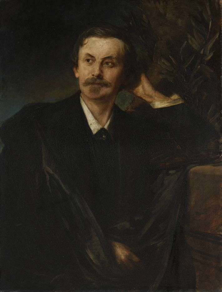 Adolf Friedrich von Schack, Öl auf Lindenholz